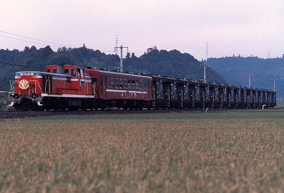 国鉄 DE10 76けん引 「大洲内子バンガロー列車」 （DE10 76+オハフ50 190「オアシス」+ヨ8000×16）